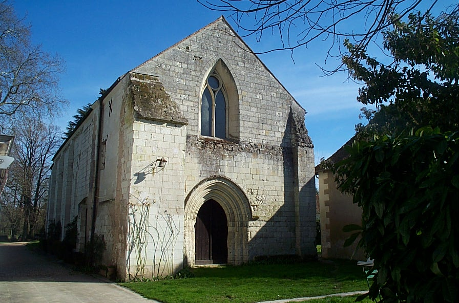 Commanderie d'Auzon à Chatellerault, Vienne, France .